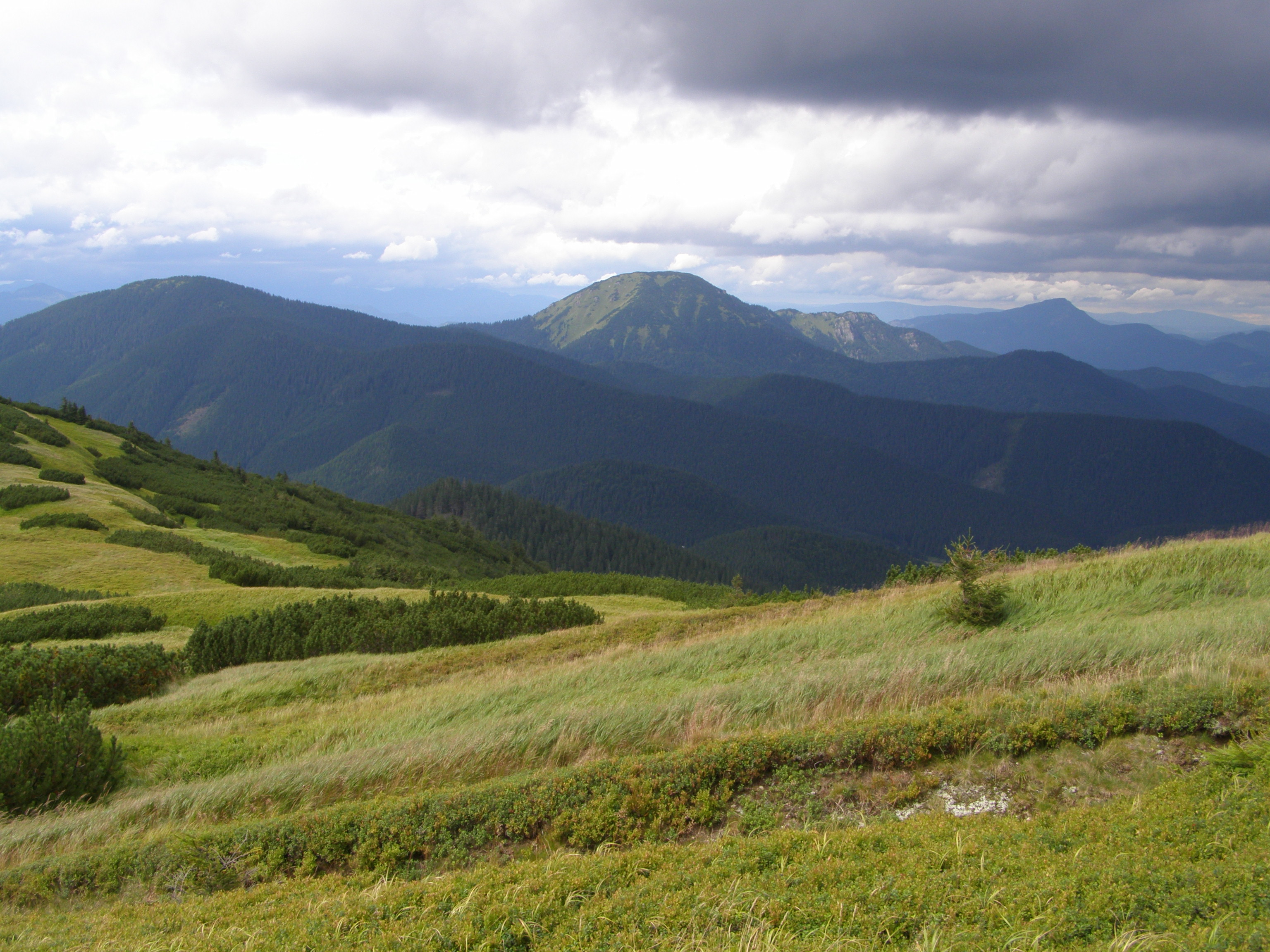 Nízké Tatry, Ďumbierské Tatry, pohled ze západního úboří vrcholu Latiborská hoľa (1643 m) na severozápad: vlevo vrchol Tlstá (1555 m), uprostřed Salatín (1630 m)